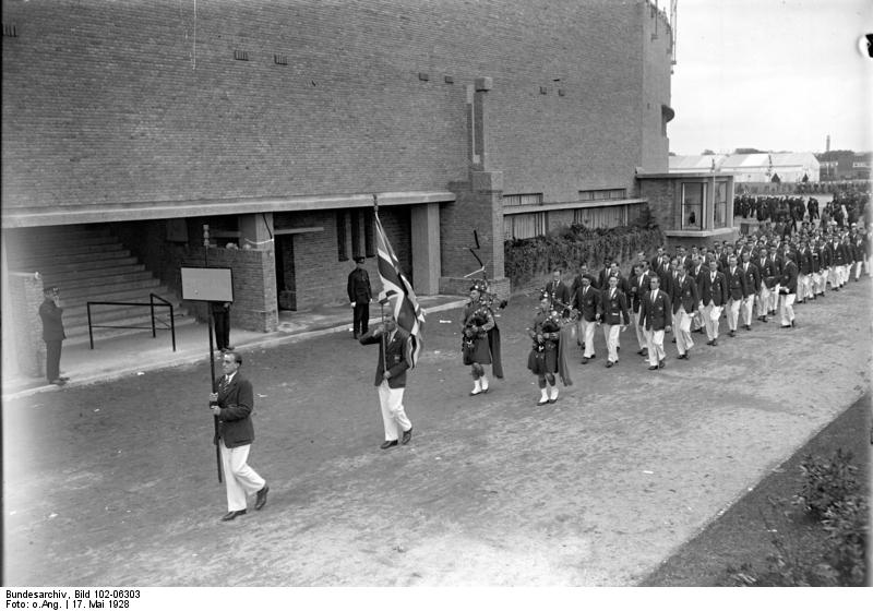 Die Eröffnung der olympischen Spiele in Amsterdam! Erste Aufnahmen vom Aufmarsch der Nationen im olympischen Stadion, unseres nach Amsterdam entsandten Sonder-Bild-Berichterstatters! Einmarsch der schottischen Teilnehmer in das olympische Stadion.